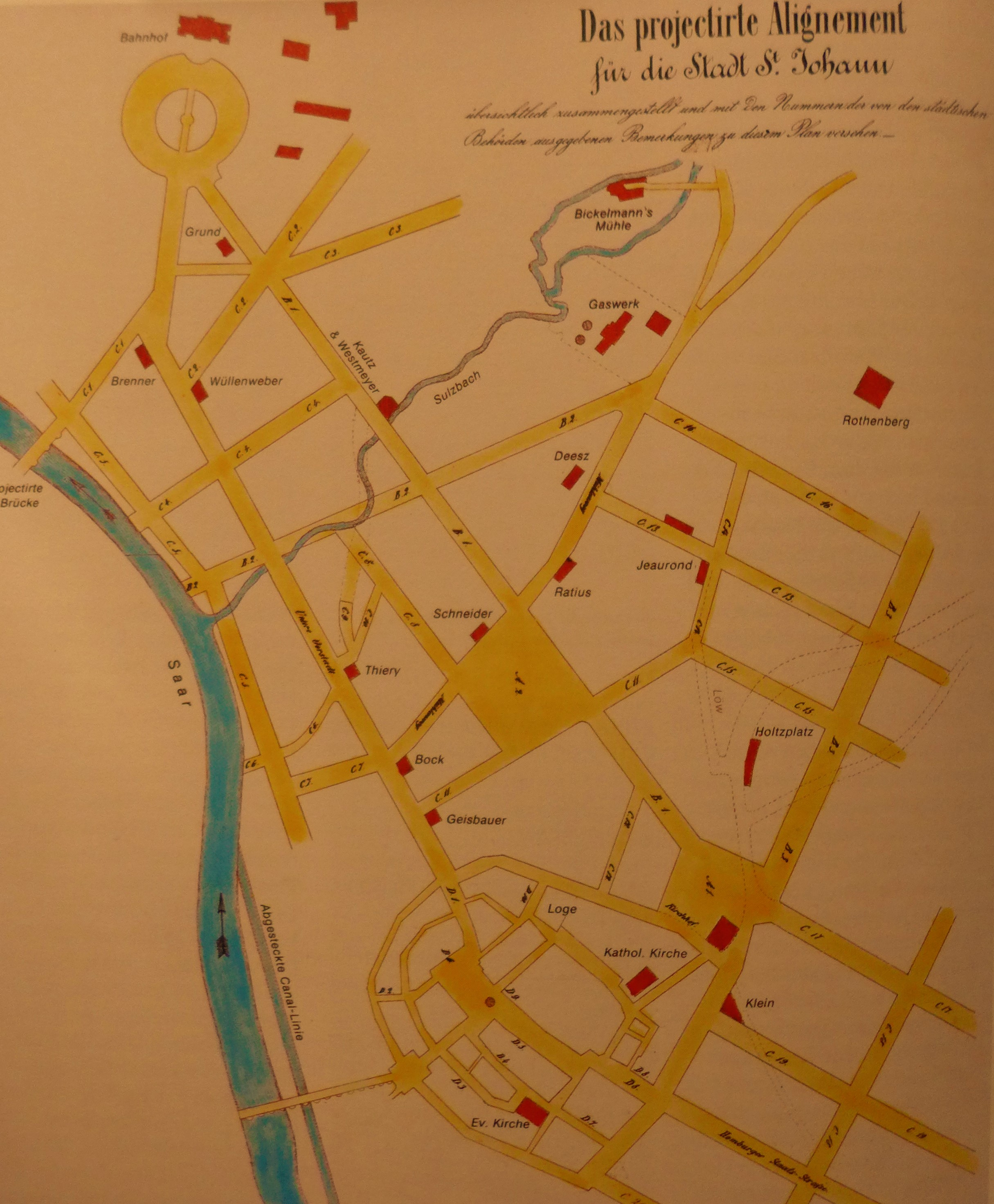 Alignementplan für die Stadt St. Johann an der Saar aus dem Jahr 1861 (Stadtarchiv Saarbrücken)